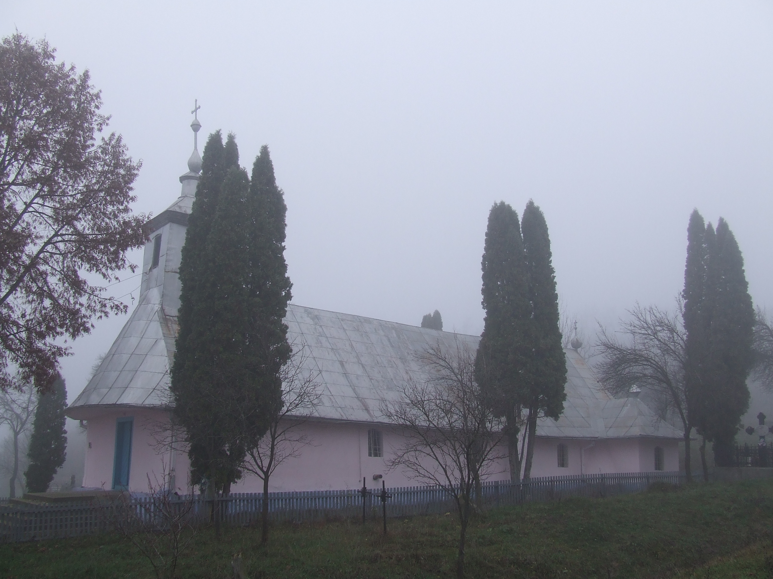 Biserica de lemn din Bărboşi, judeţul Mureş.